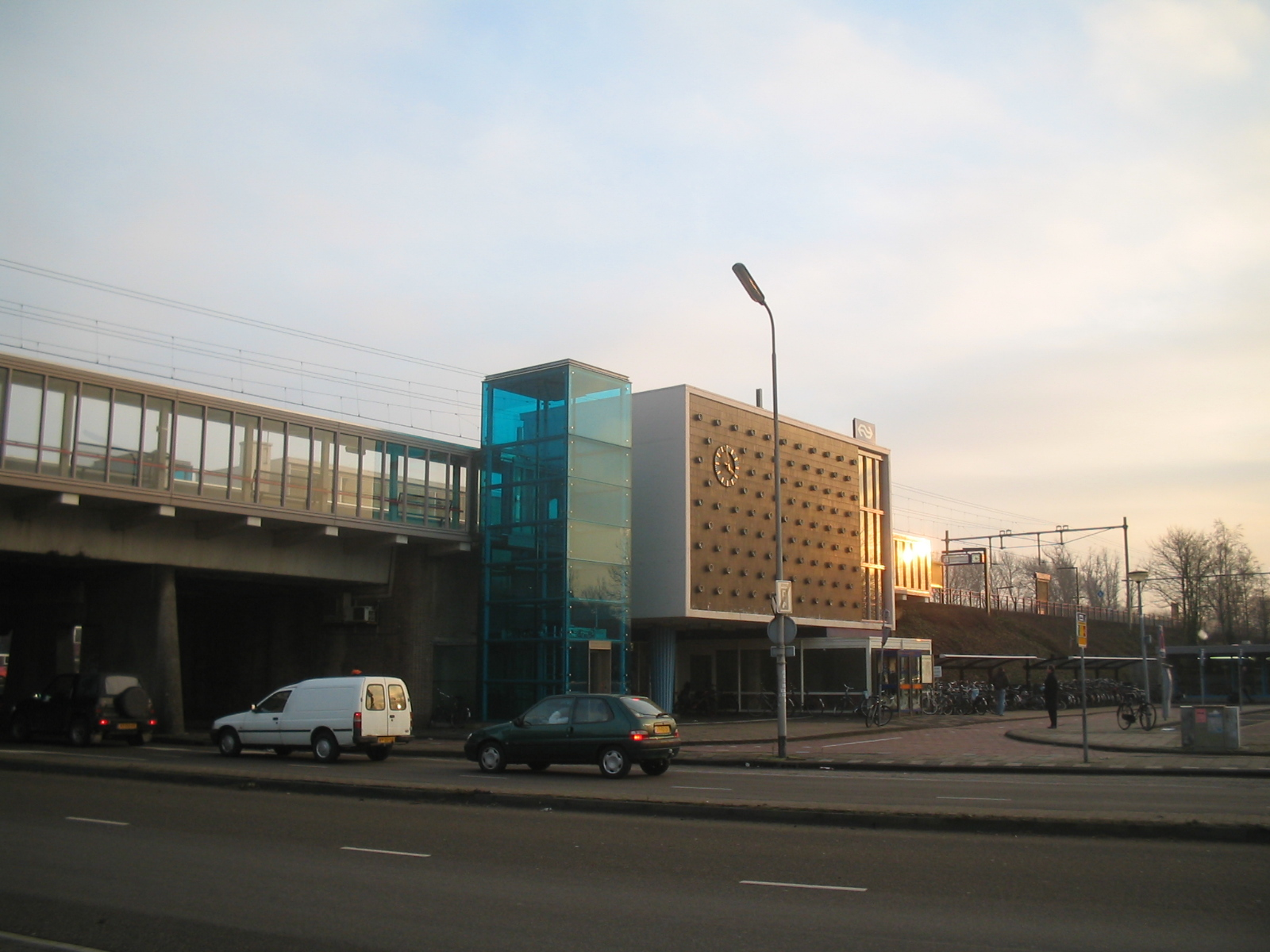 station Heemstede-Aerdenhout, januari 2006